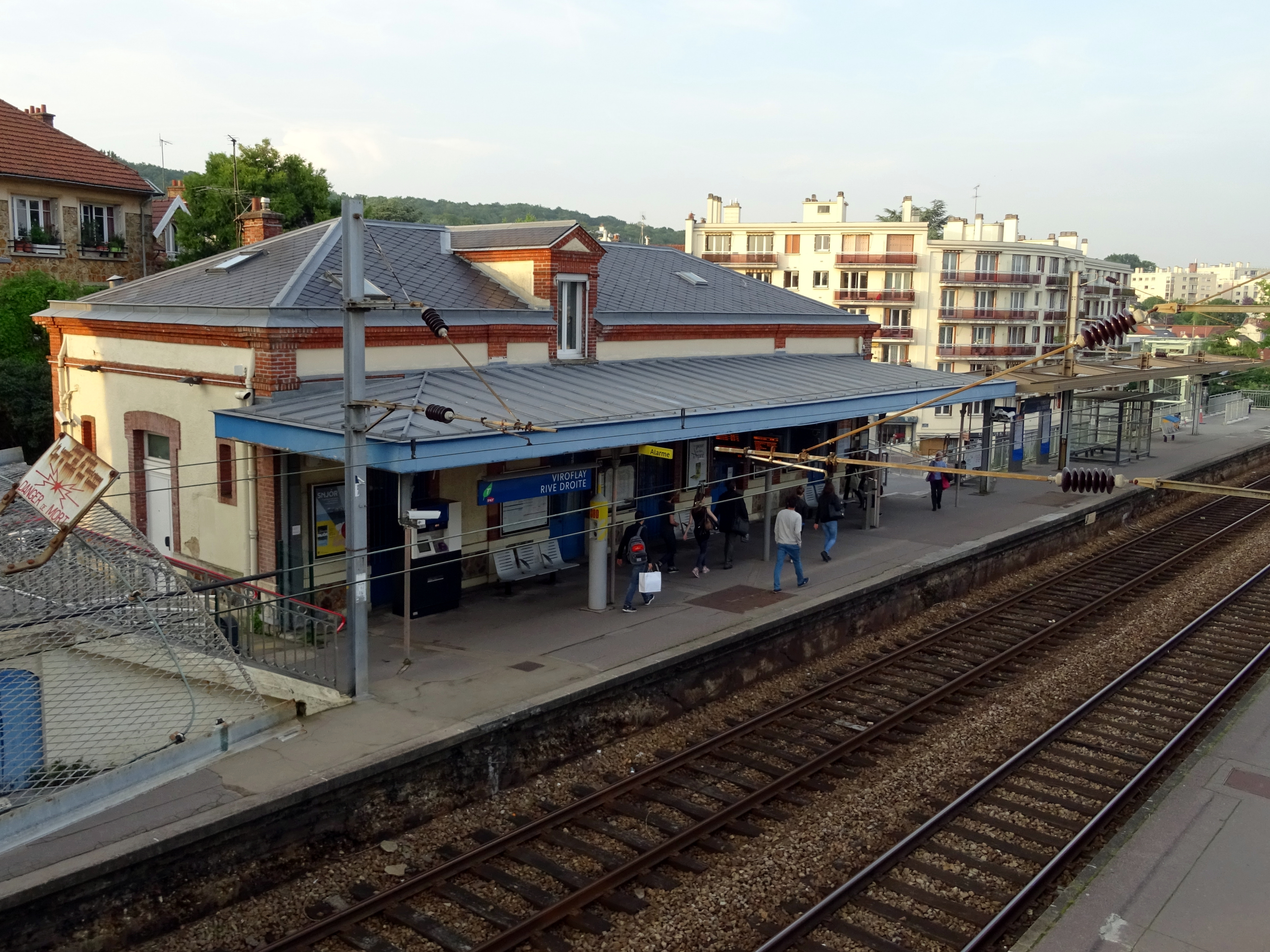 Gare de Viroflay-Rive-Droite, Yvelines, France, vue depuis la passerelle.